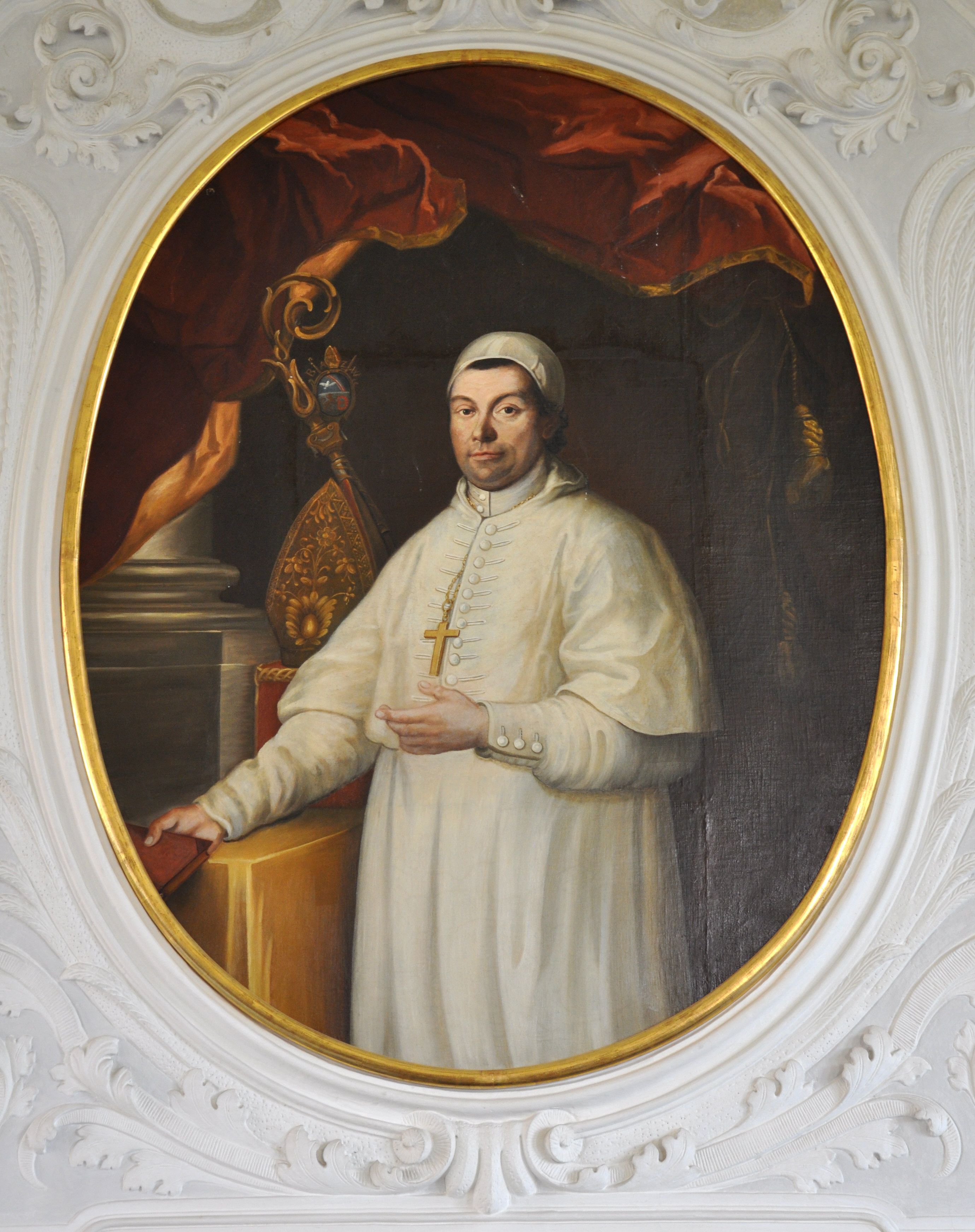 Weißenau, Konventsbau der ehemaligen Reichsabtei Weißenau, Festsaal, Gemälde: Portrait des Abts Bonaventura Brem (unbekannter Maler)